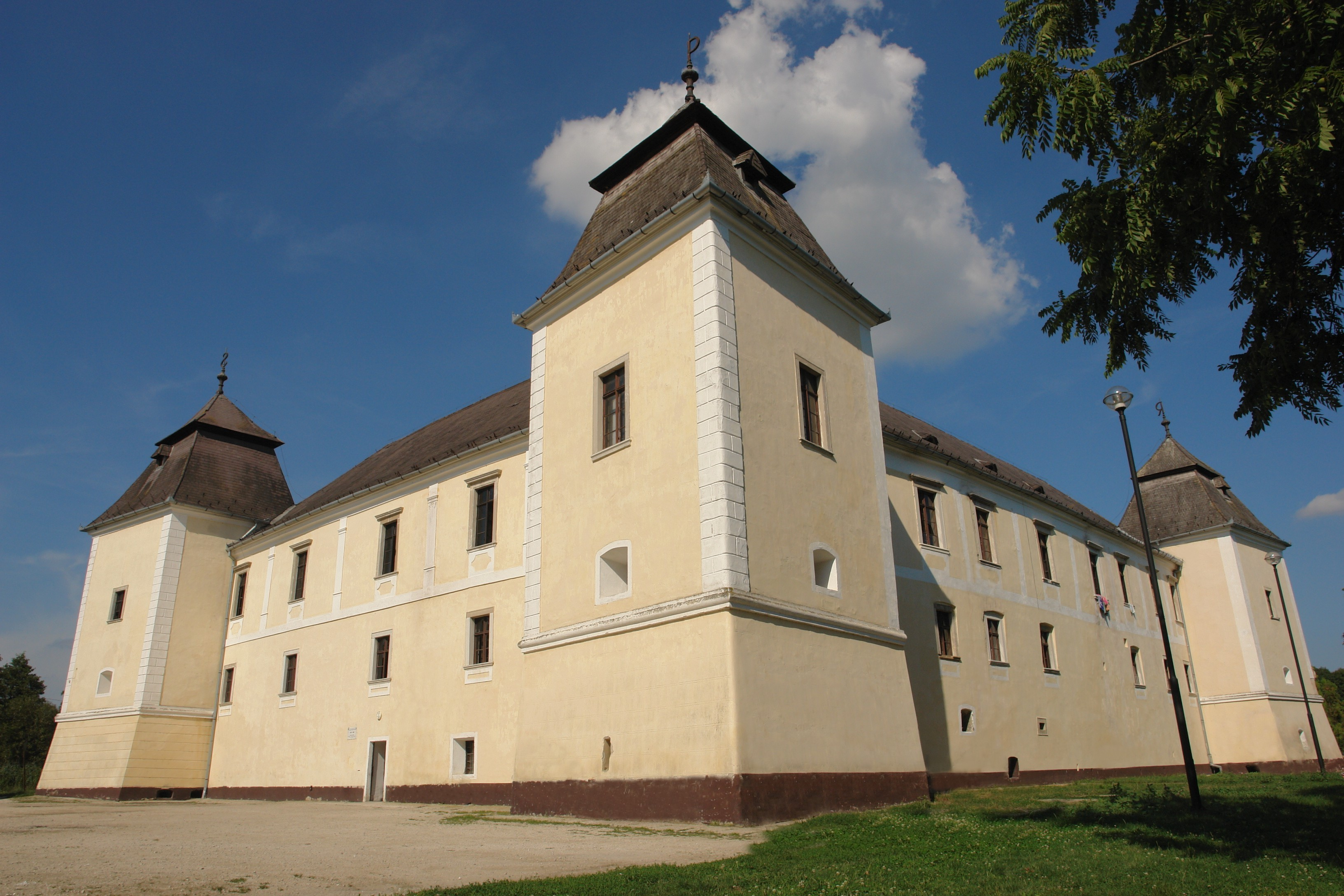 várkastély, Egervár This is a photo of a monument in Hungary. Identifier: 10807